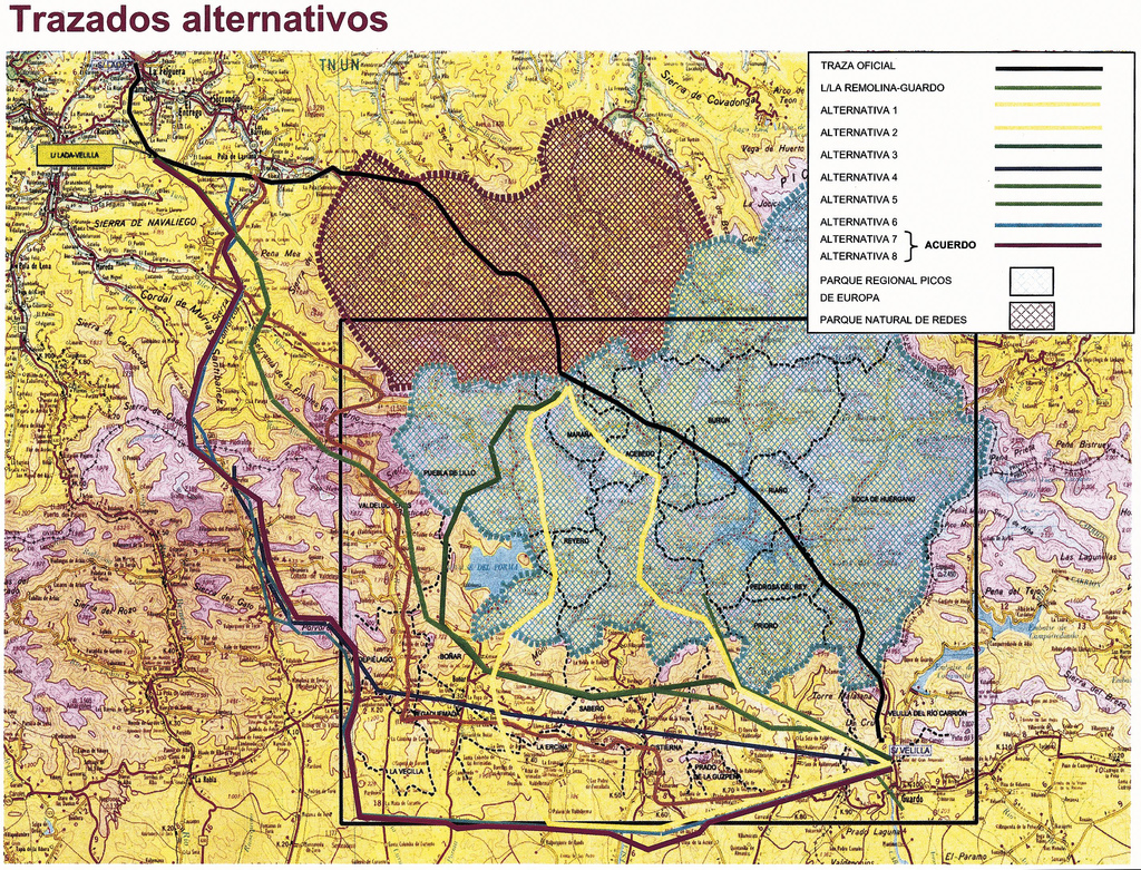 Mapa de los distintos trazados alternativos para el paso de la línea de alta tensión entre Lada (Asturias) y Velilla del Río Carrión (Palencia).